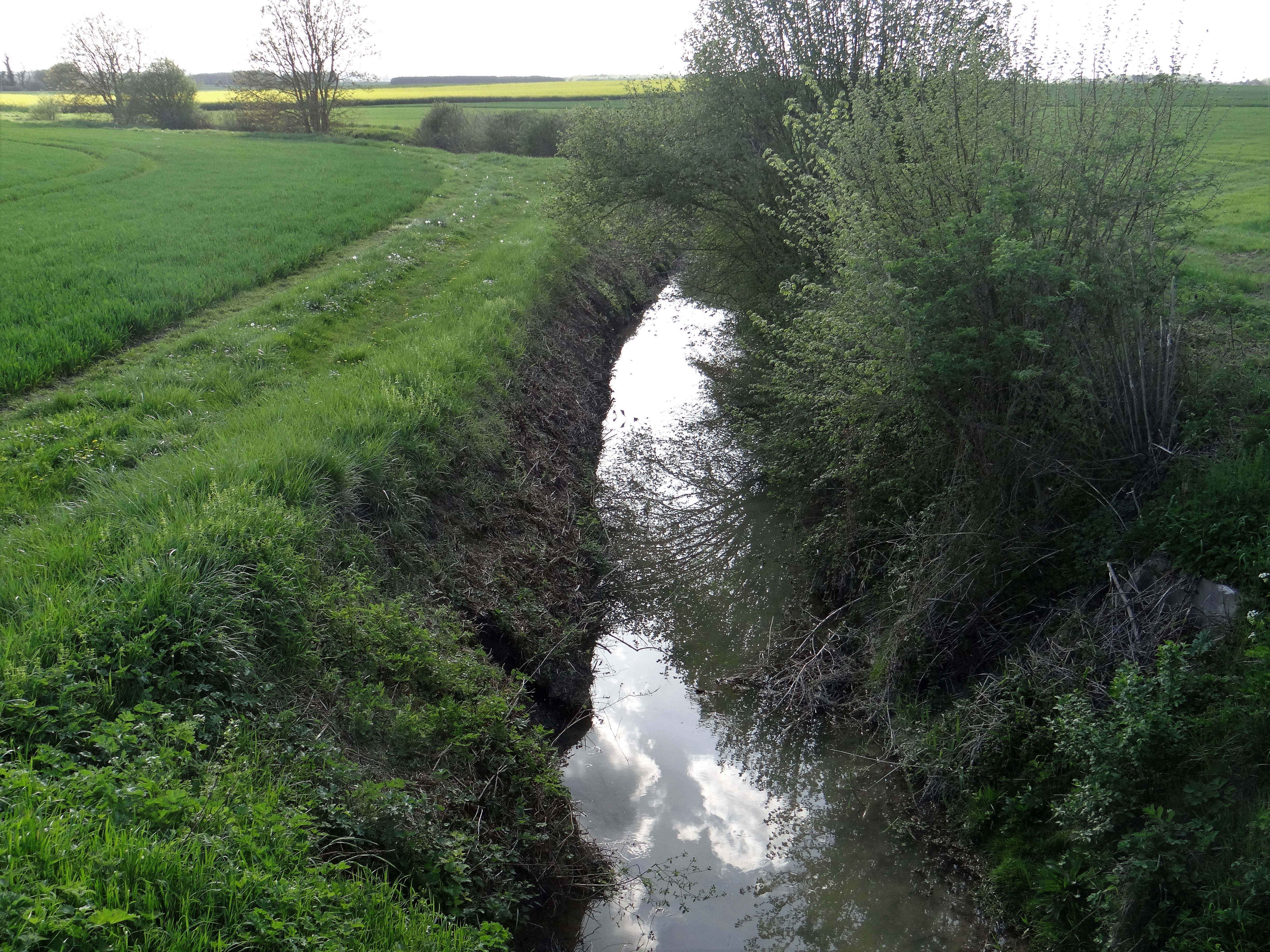 La Bouville à Mézières-en-Gâtinais, Loiret, France.